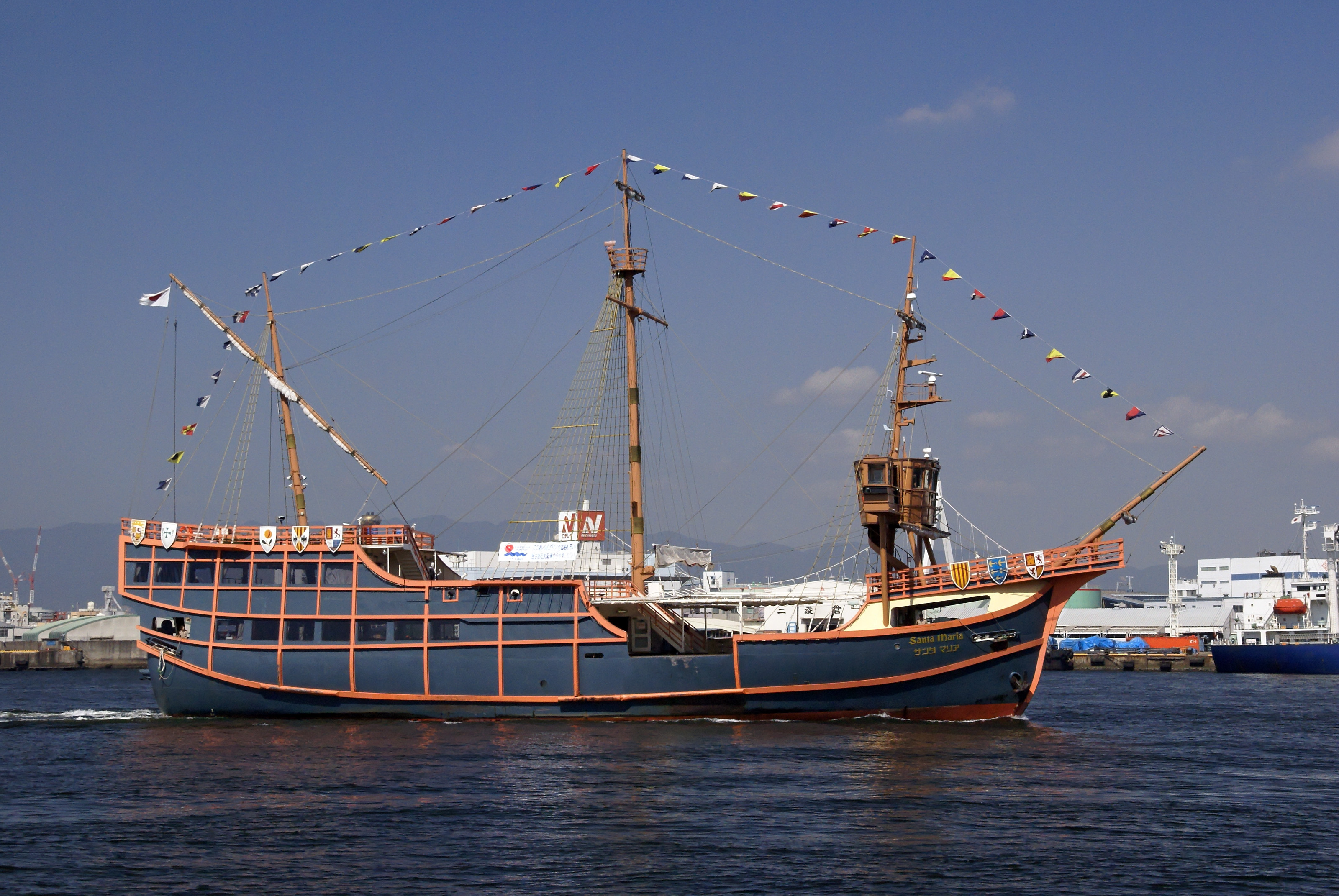 Passenger ship "Santa María" in Osaka, Osaka prefecture, Japan